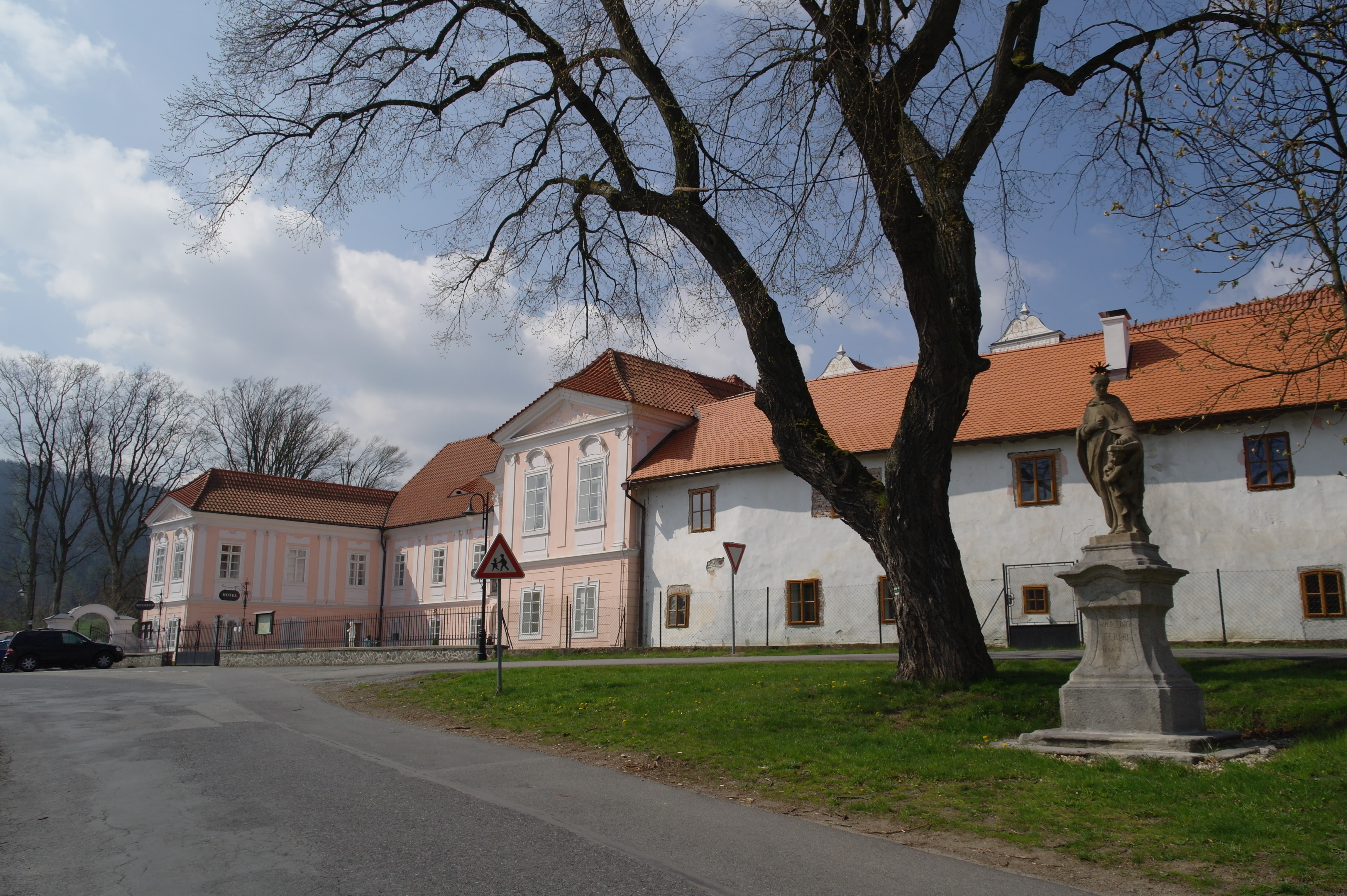 Socha svatého Vincence, před zámkem, pp. 1297/1, Hrádek (okres Klatovy).